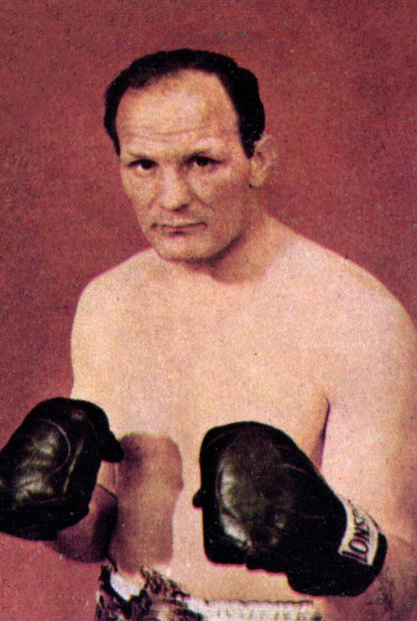 Figurina CAMPIONI DELLO SPORT 1969/70- n. 356 - H. COOPER (GBR)- PUGILATO